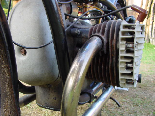 BMW de válvulas laterales (1937).